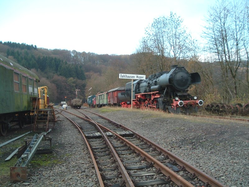 Eine Dampflok des Typs BR 52 (nicht fahrtüchtig) auf dem Gelände des Eisenbahnmuseums in Dahlhausen.